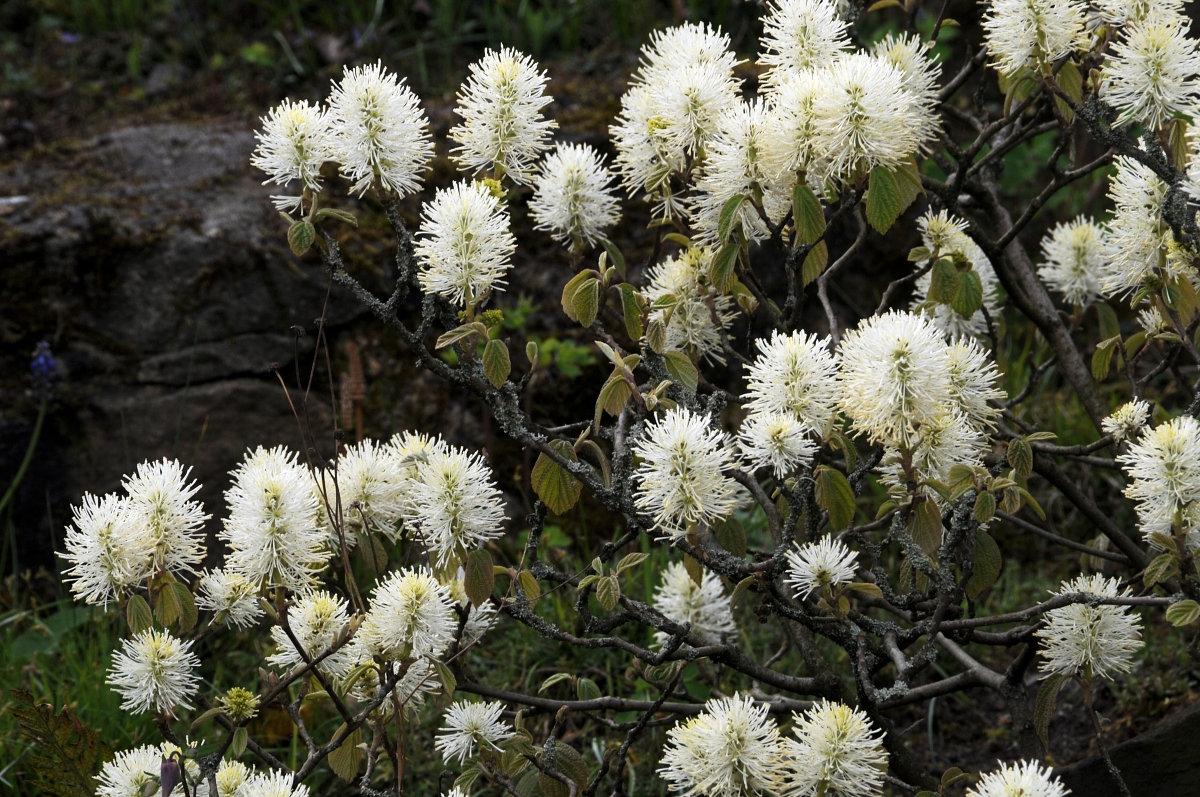 Fothergilla gardenii, Palmengarten, Frankfurt am Main, Hessen, Deutschland